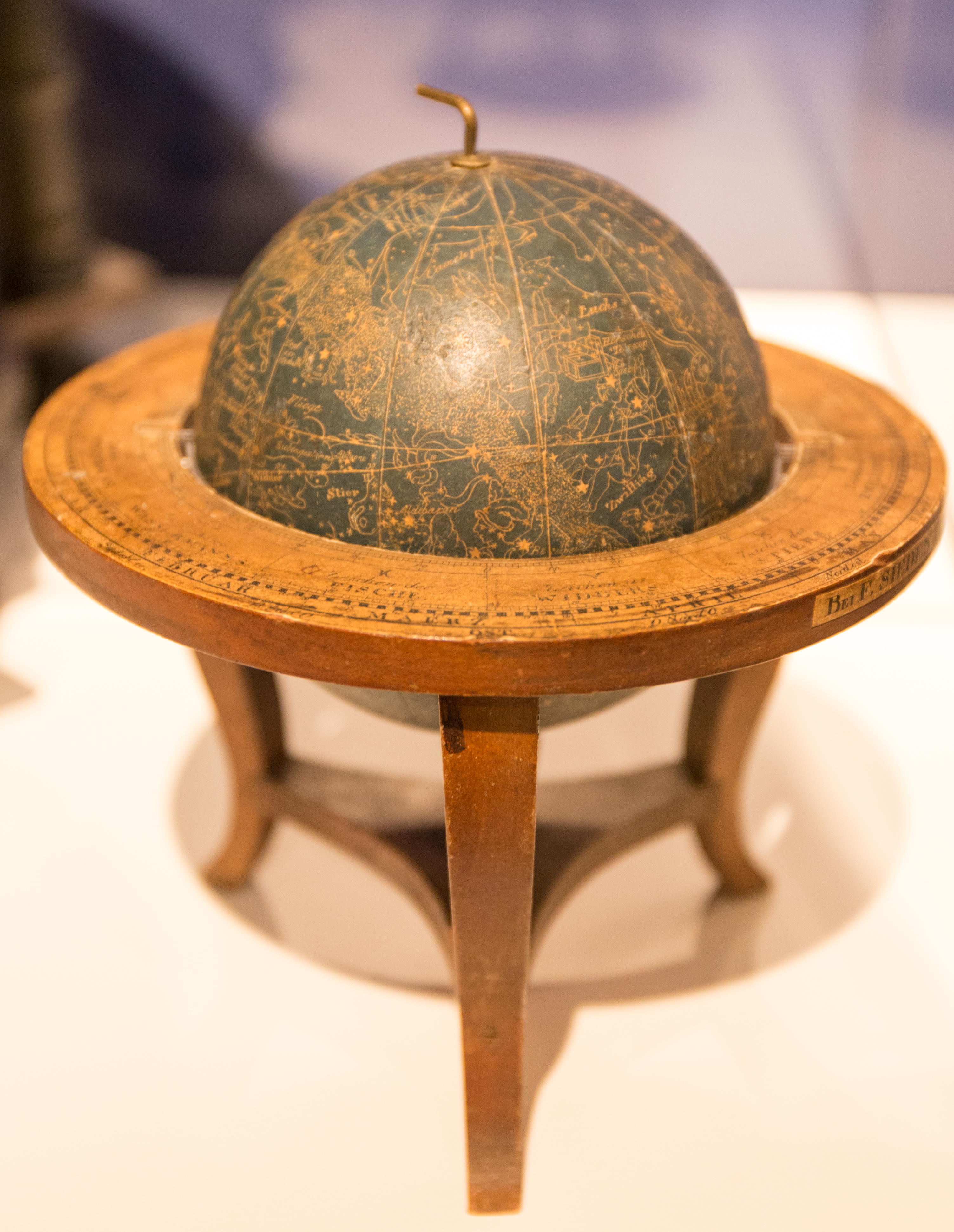 Der Himmelsglobus ist eine Erfindung der Antike, der bei maßgenauer Anfertigung ein unversehrtes, spiegelverkehrtes Bild der Sternen-Position am Nachthimmel Abbildet. Allerdings muss sich der Betrachter in den Globus „hineinversetzen“, um den Nachthimmel richtig zu sehen. In einer wirtschaftlichen Blütezeit der Niederlande, die nicht zuletzt auf den Reichtum überseeischer Kolonien beruhte, spezialisierten sich der Amsterdamer Kartograf und Kupferstecher Gerard Valck und dessen Sohn Leonard auf die Herstellung von Globen. Für die Seefahrer waren sie wichtige Orientierungshilfen.